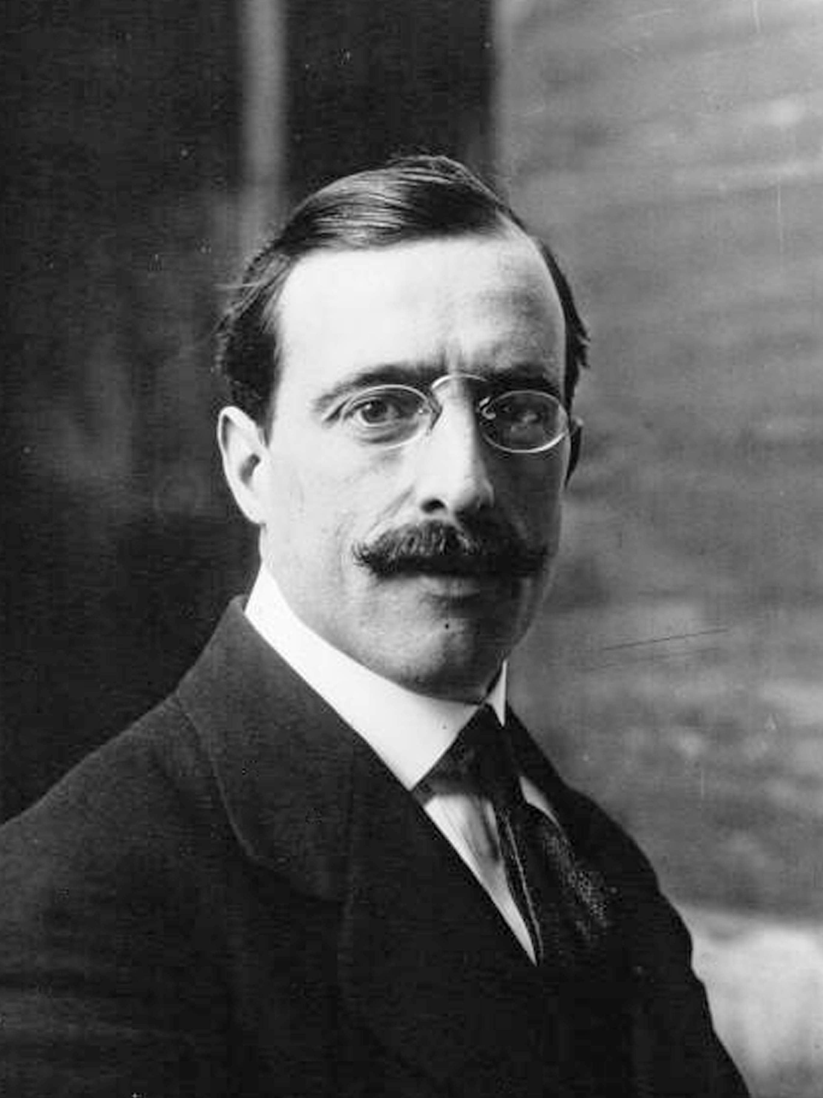 M. Dalbiez, député des Pyrénées Orientales [photographie de presse]